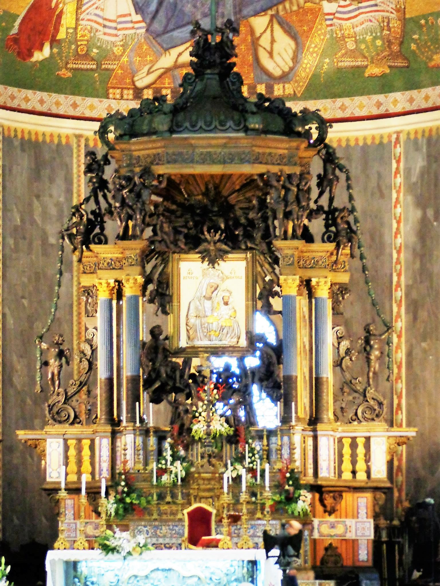 Altare duomo